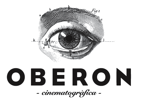 Logo Oberon Cinematográfica